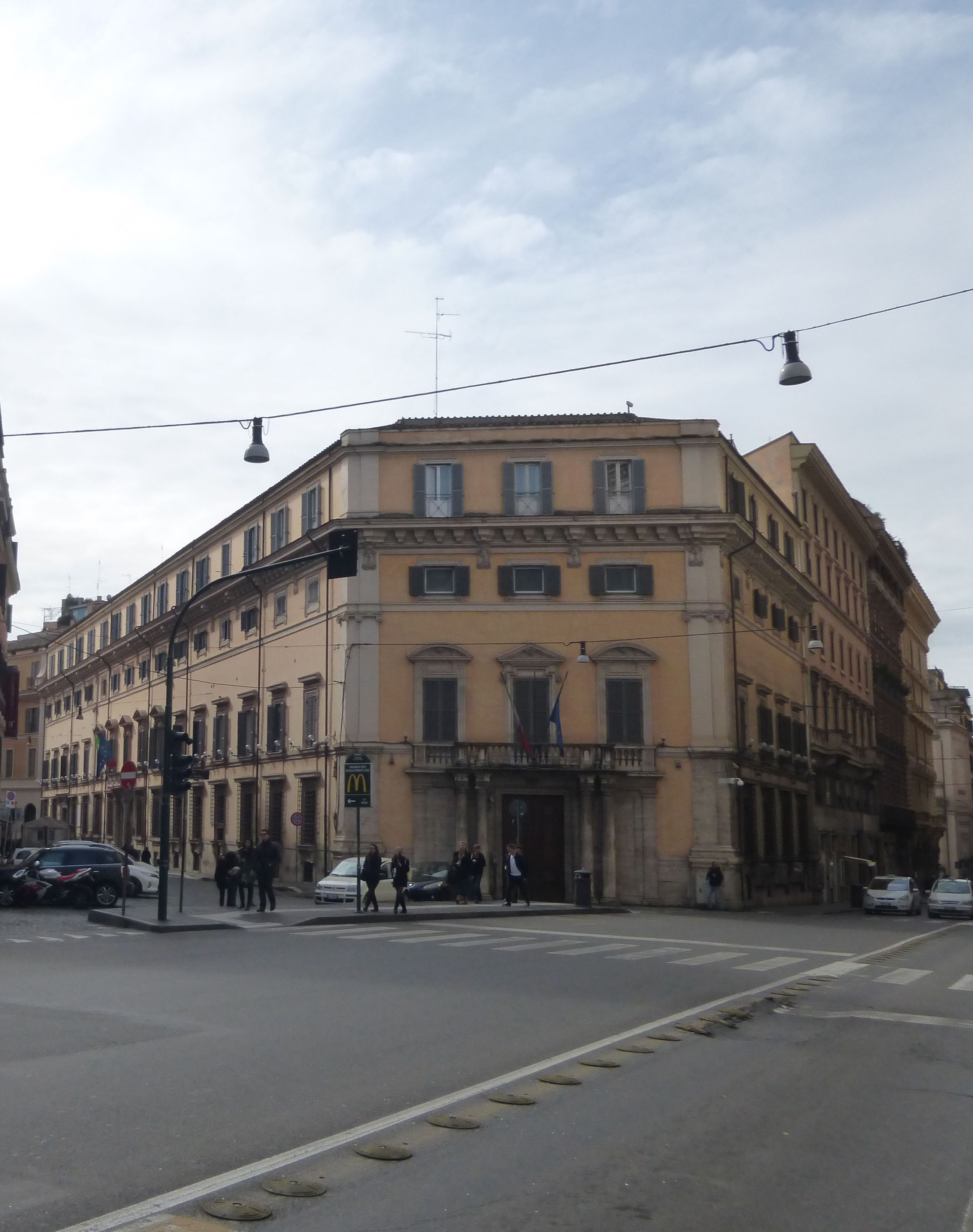 Roma, via della Stamperia angolo Tritone, palazzo Cornaro.